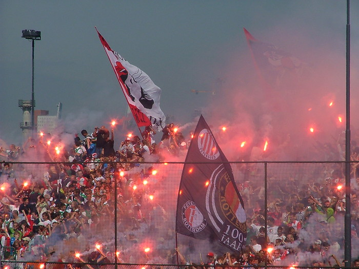 De foto is genomen in Rotterdam vanaf de tribunes die bij het trainingsveld naast de kuip waren geplaatst voor de eerste training(en).